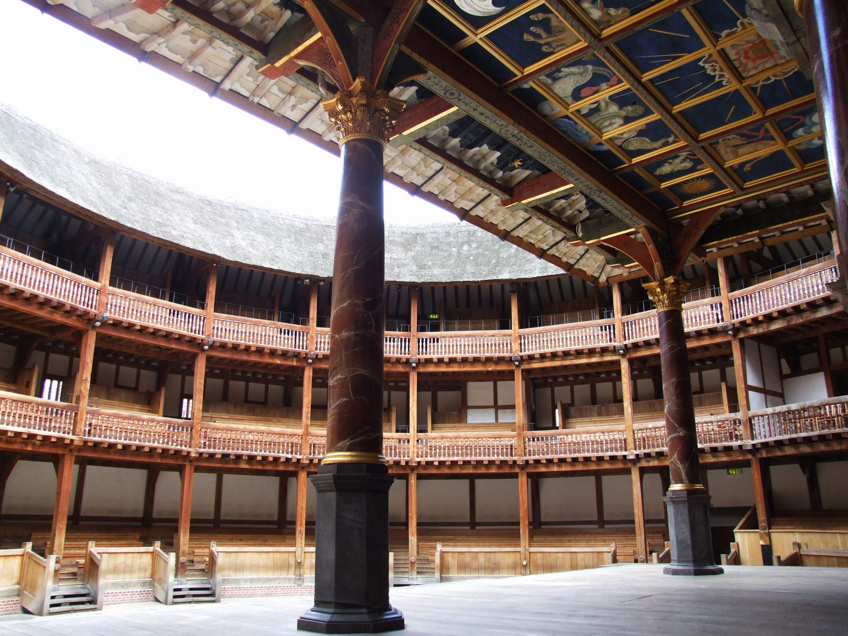 Innenraum des Globe Theatre in London